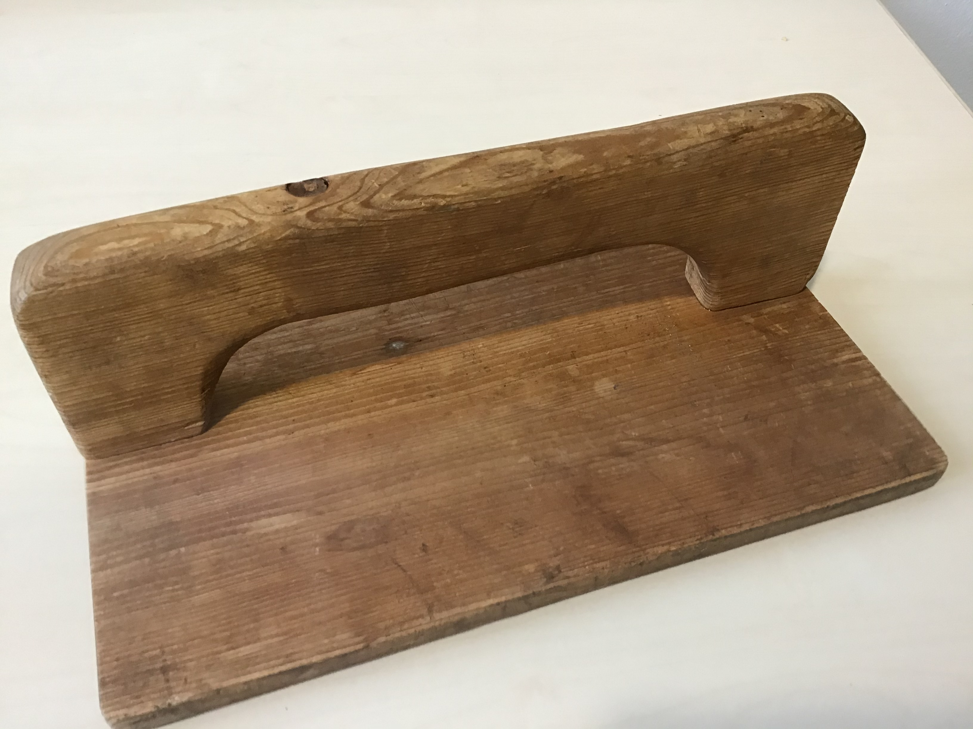 Andrückbrett für Aussaat in Pflanzkisten